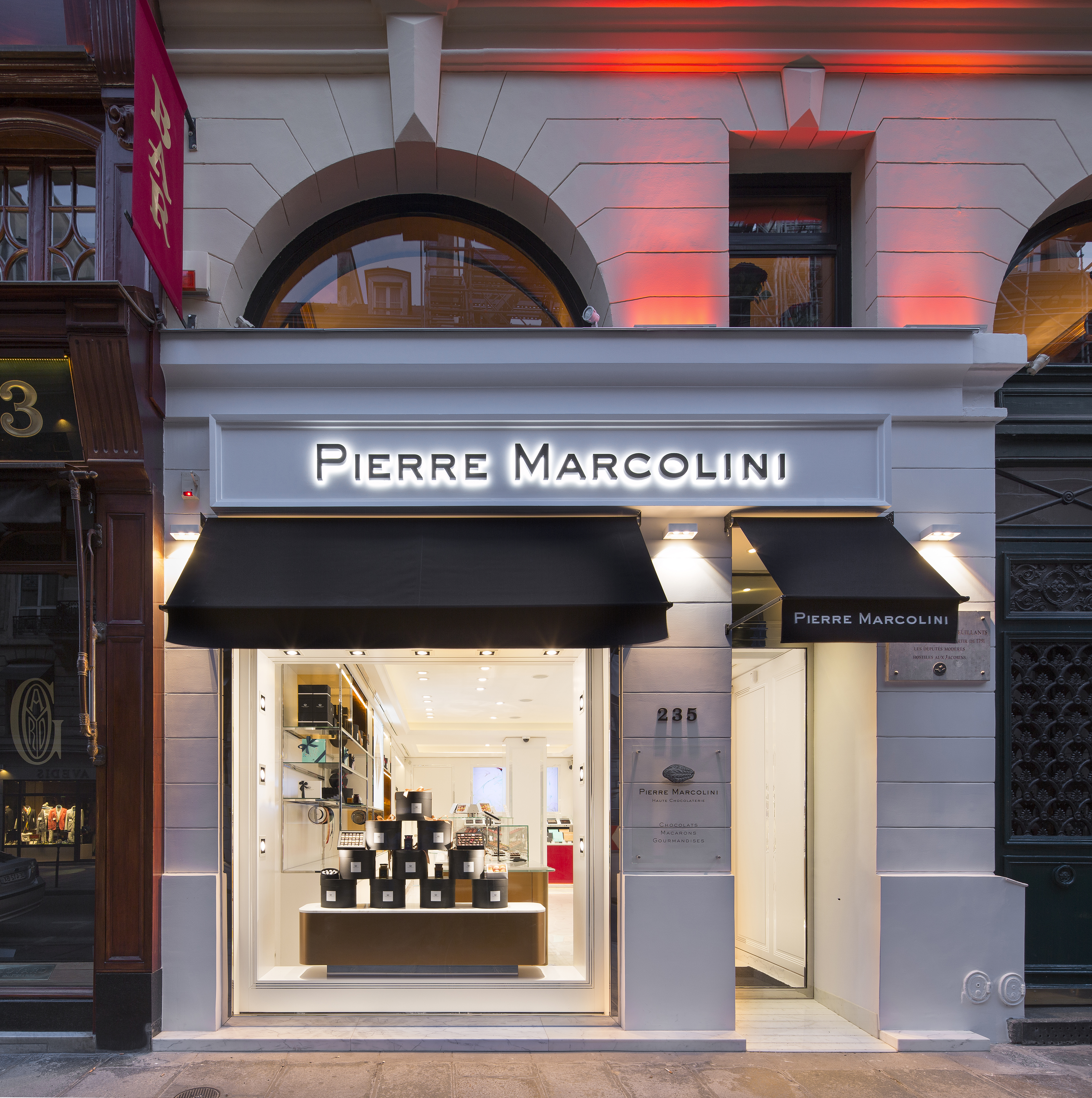 Exterieur de la Boutique de Pierre Marcolini, 235 Rue Saint-Honoré, 75001 Paris, France.